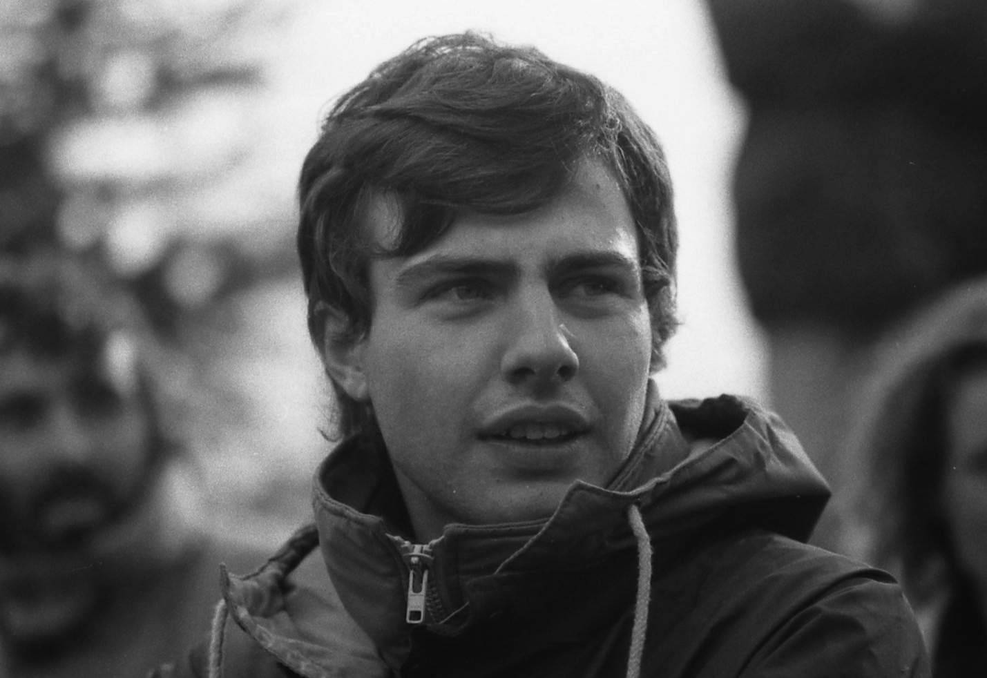 Hervé Delamarre sur les Championnats de Normandie 1988 à Condé-sur-Vire